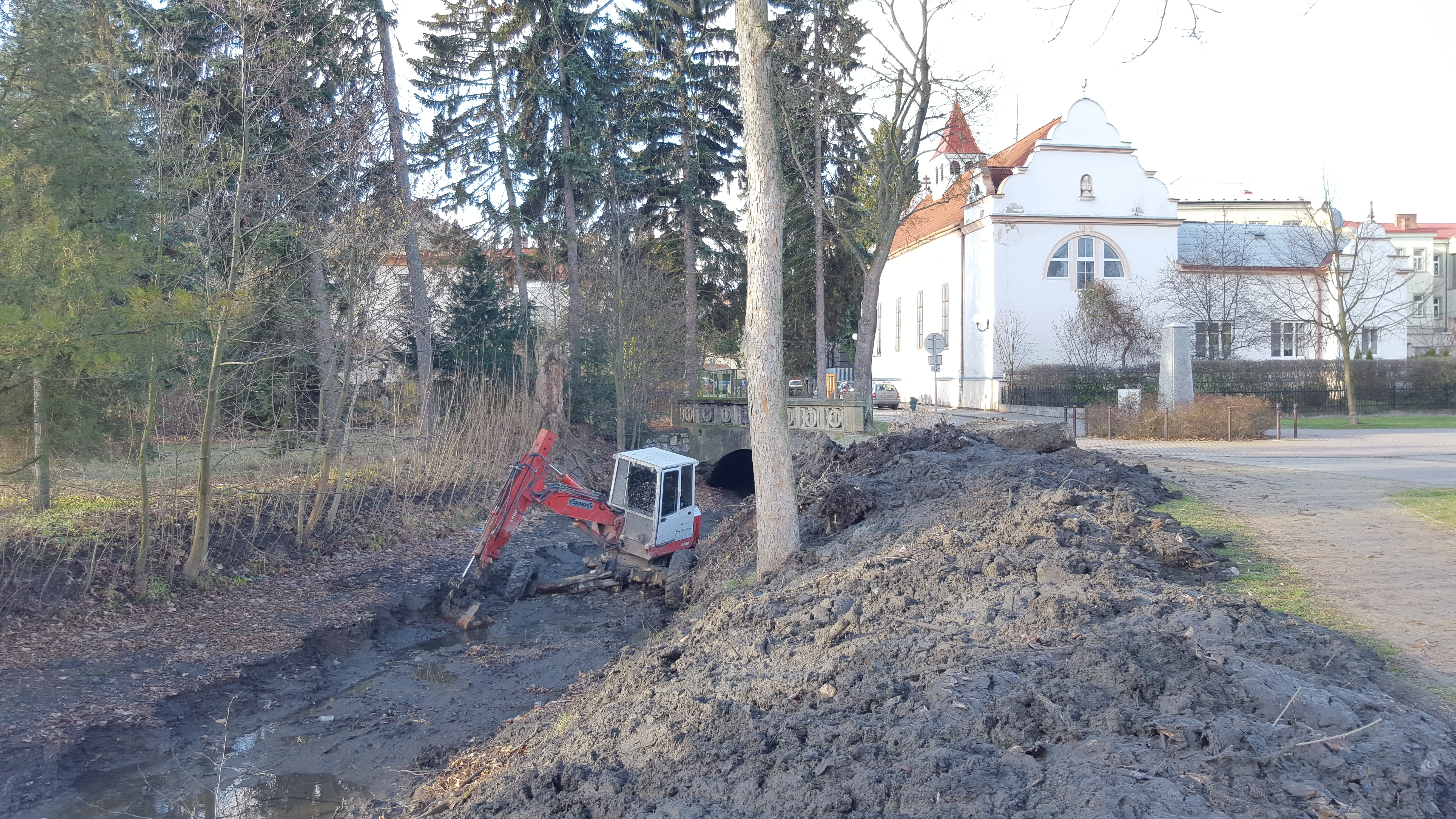 Čištění koryta Nečízu v Litovli na konci roku 2015